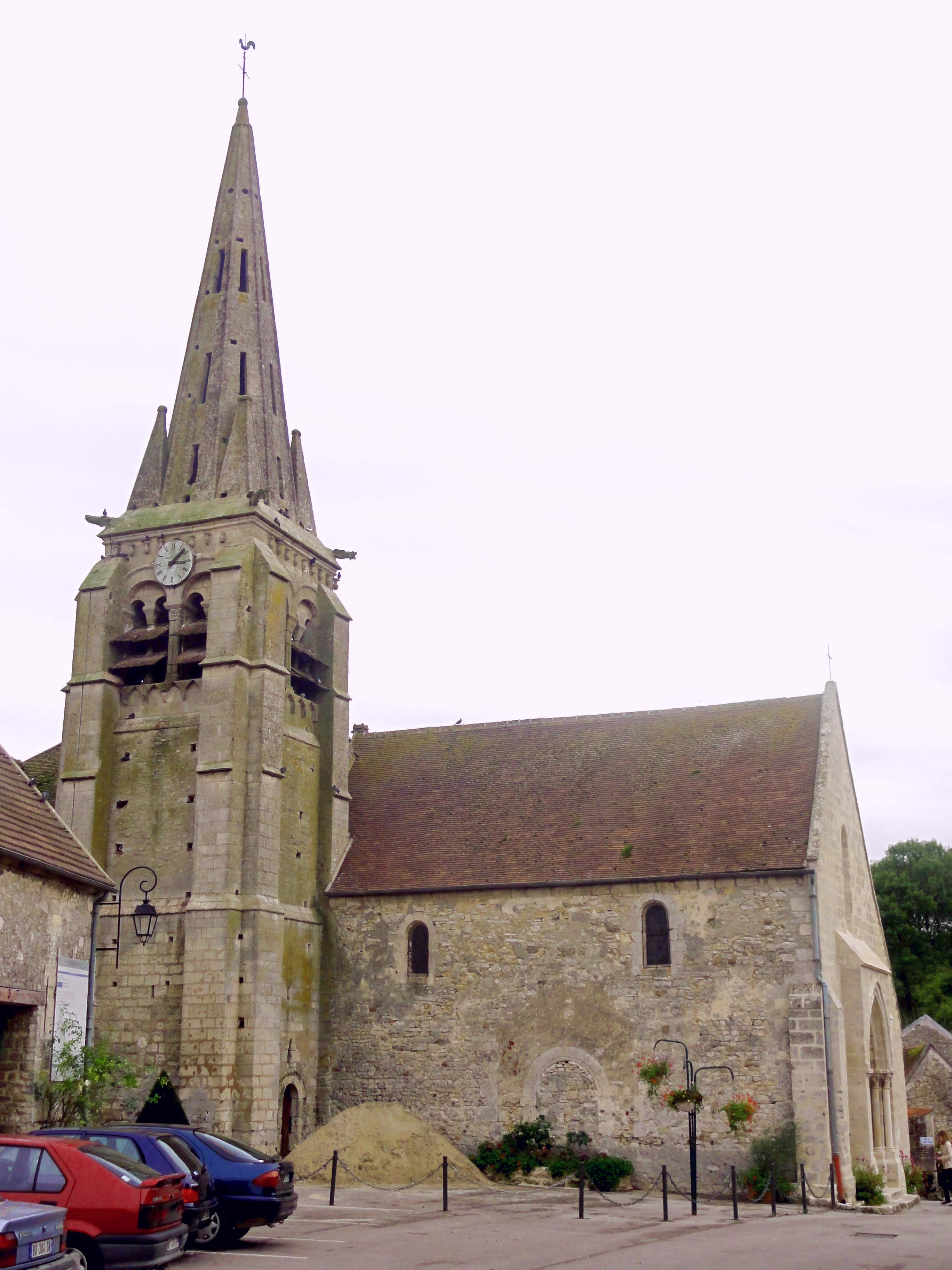 Vue depuis le nord - clocher et nef romane. Il n'y a pas de bas-côté au nord.